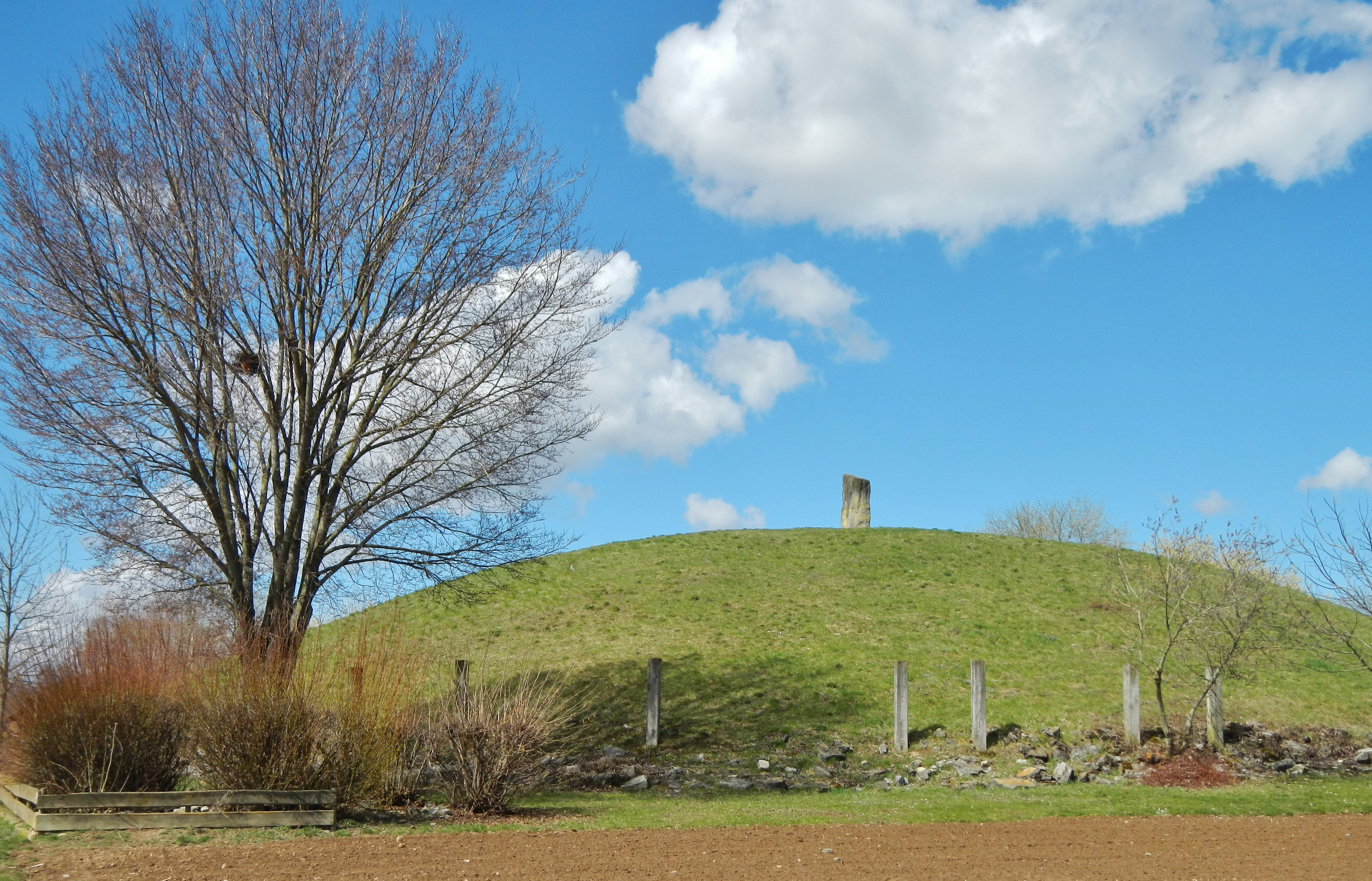 Keltengrab, keltischer Grabhügel von Hochdorf, celtic burial mound